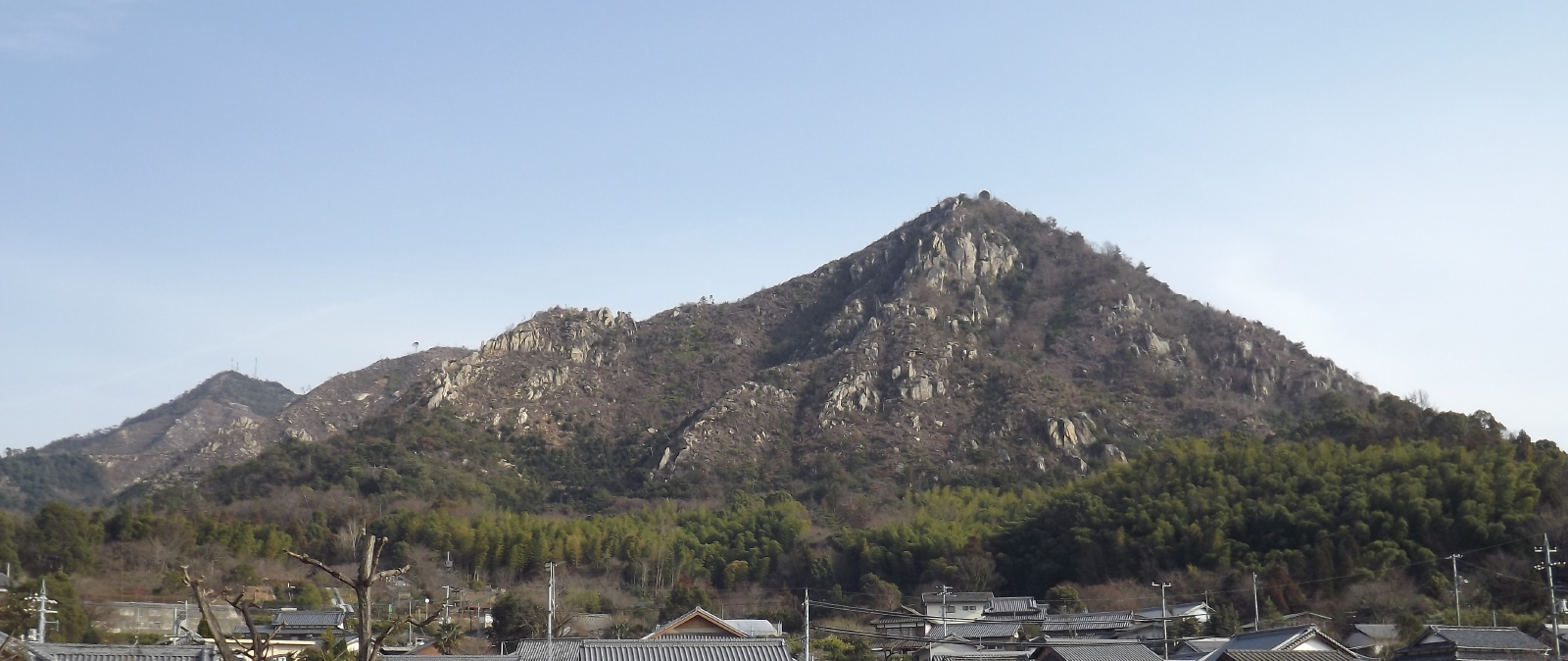 大三島の安神山